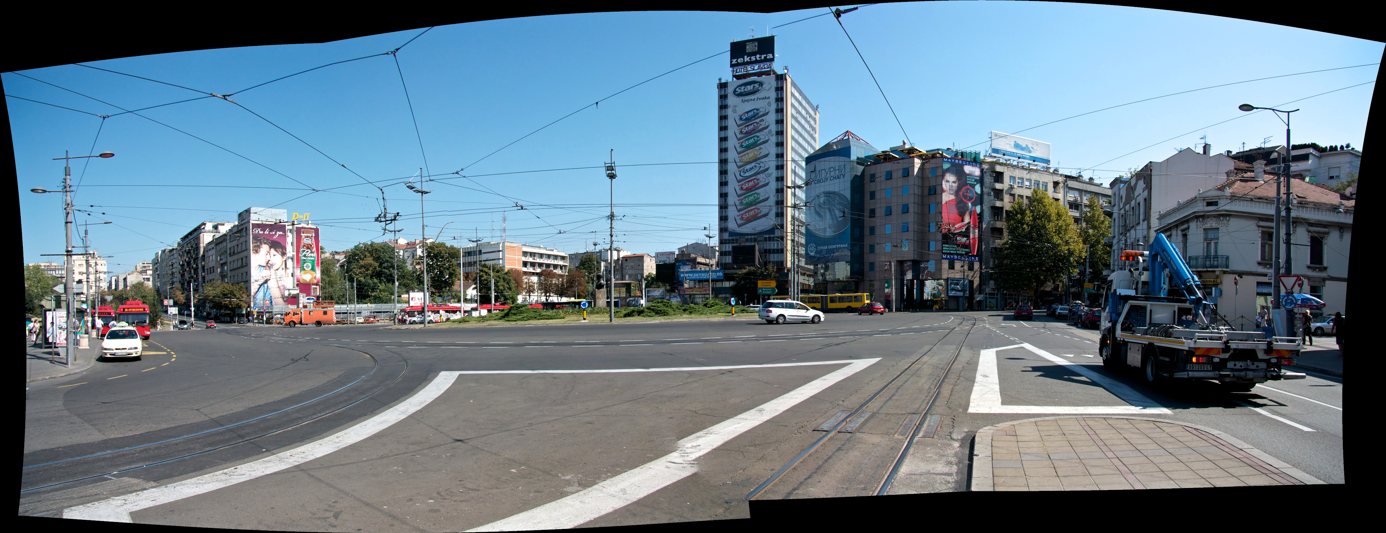 uma das principais praças da cidade de Belgrado.